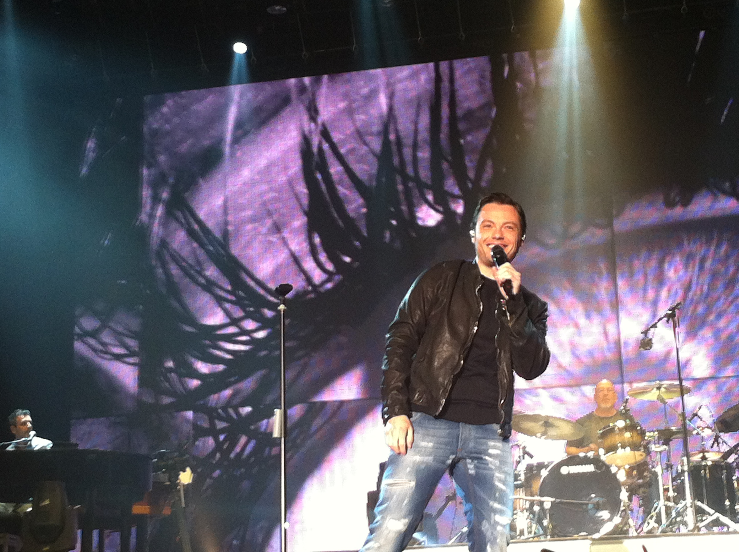 L'amore è una cosa semplice Tour 2012 di Tiziano Ferro, 25-04-12, Nelson Mandela Forum, Firenze